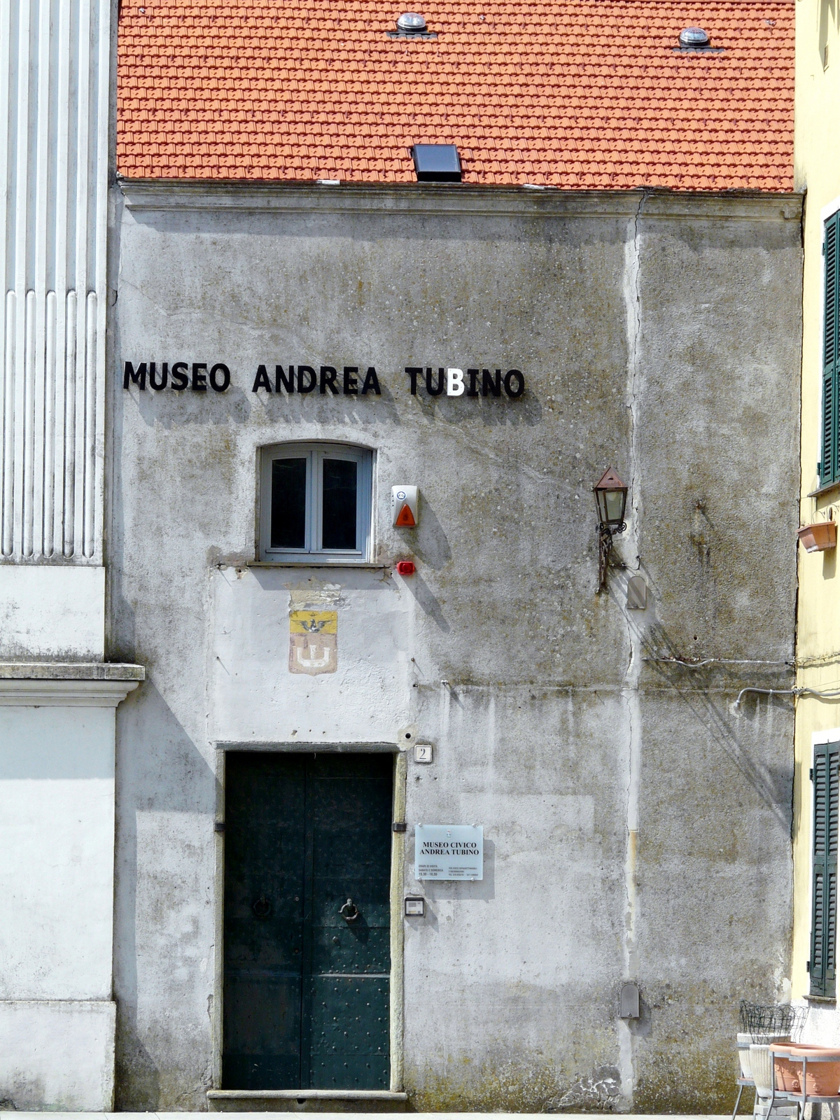 Museo civico del ferro Tubino, Masone, Liguria, Italia